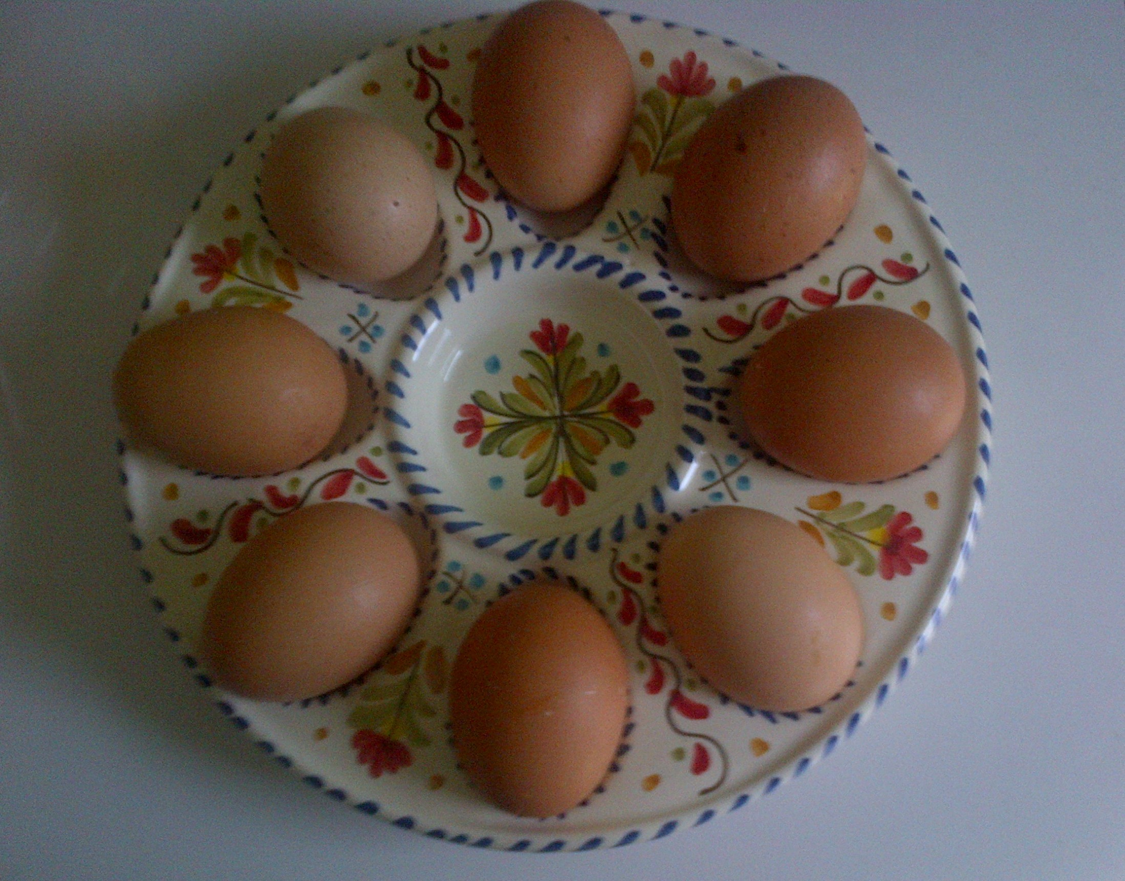 Huevos